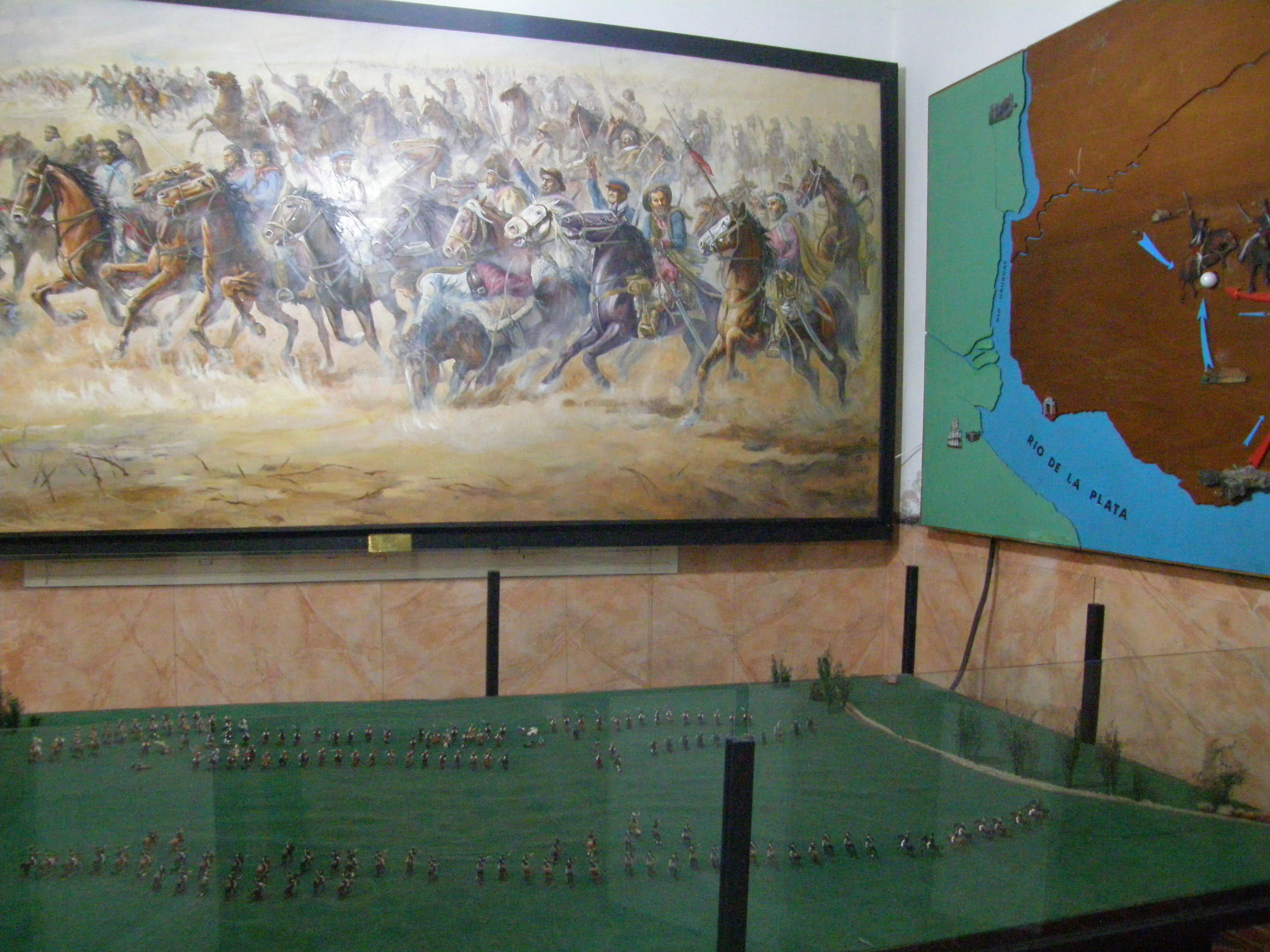 Maqueta de la Batalla de Sarandí, mural donde se localiza el itinerario de los combatientes, cuadro de la batalla. Se acompaña de una narración de los acontecimientos en audio.